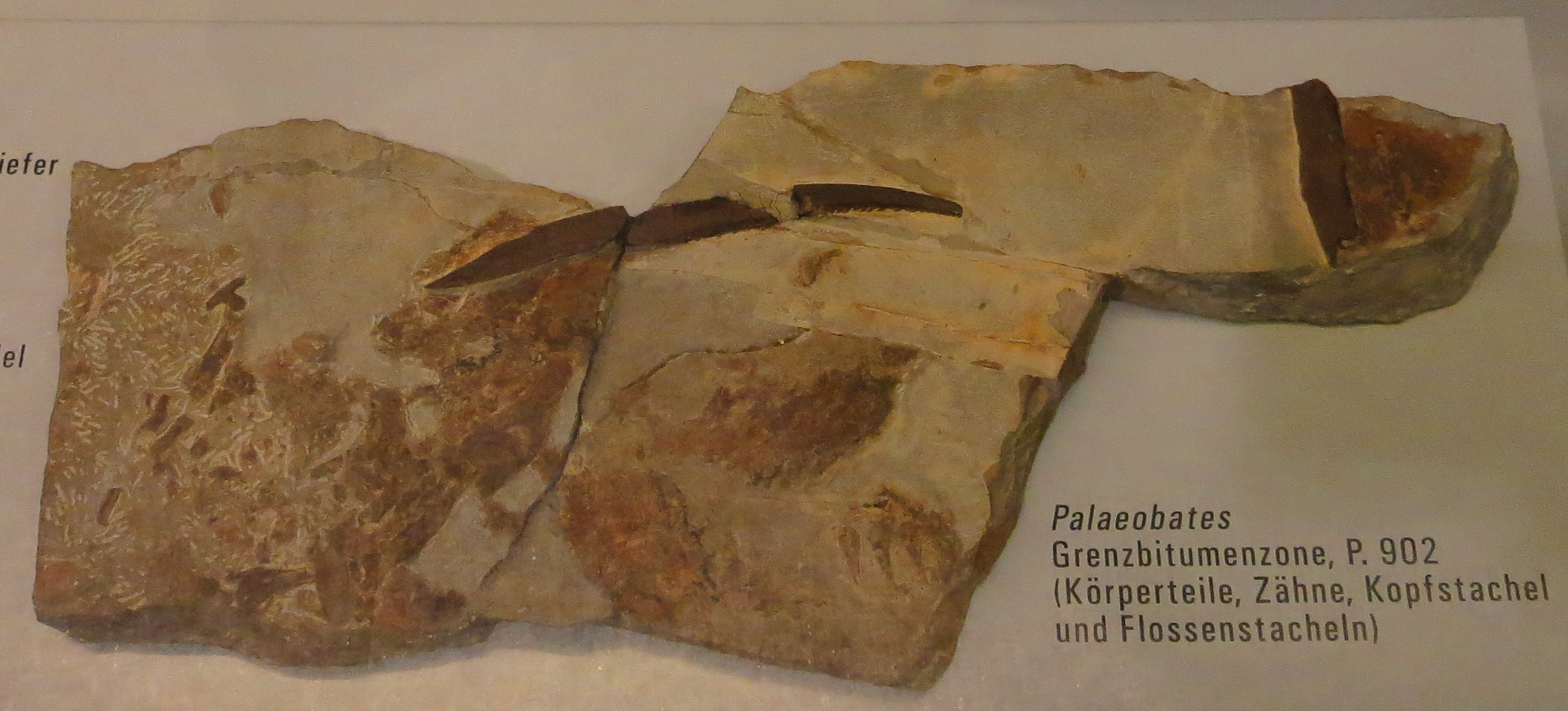 Fossil - Took the picture at Museum of Natural History Zurich